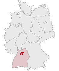 Landkreis Heilbronn, Baden-Württemberg, Germany